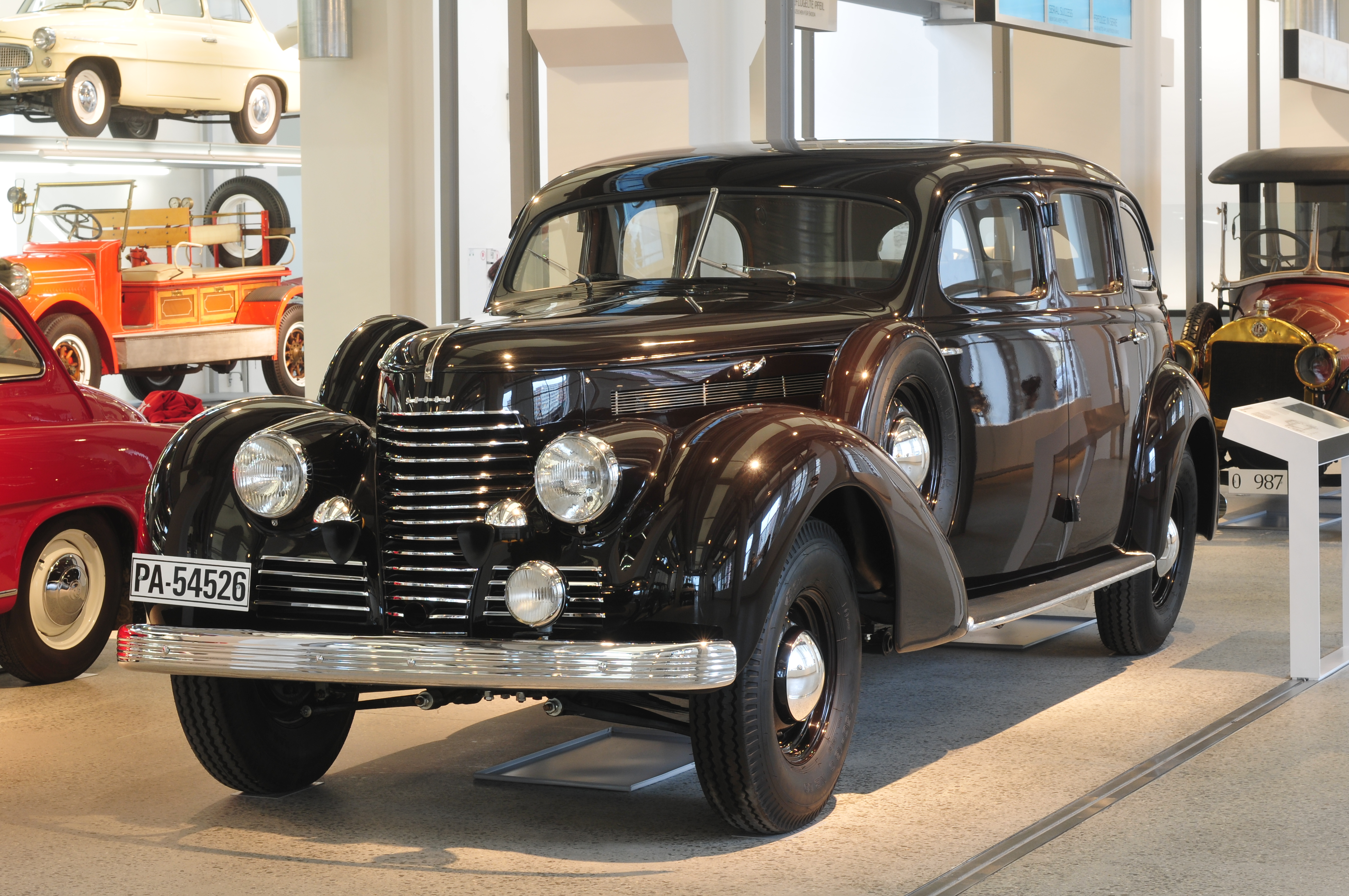 Fototermin Škoda Museum Mladá Boleslav 2013 Fototermin Škoda Muzeum 5. April 2013 in Mladá Boleslav This work is free and may be used by anyone for any purpose. If you wish to use this content, you do not need to request permission as long as you follow any licensing requirements mentioned on this page.